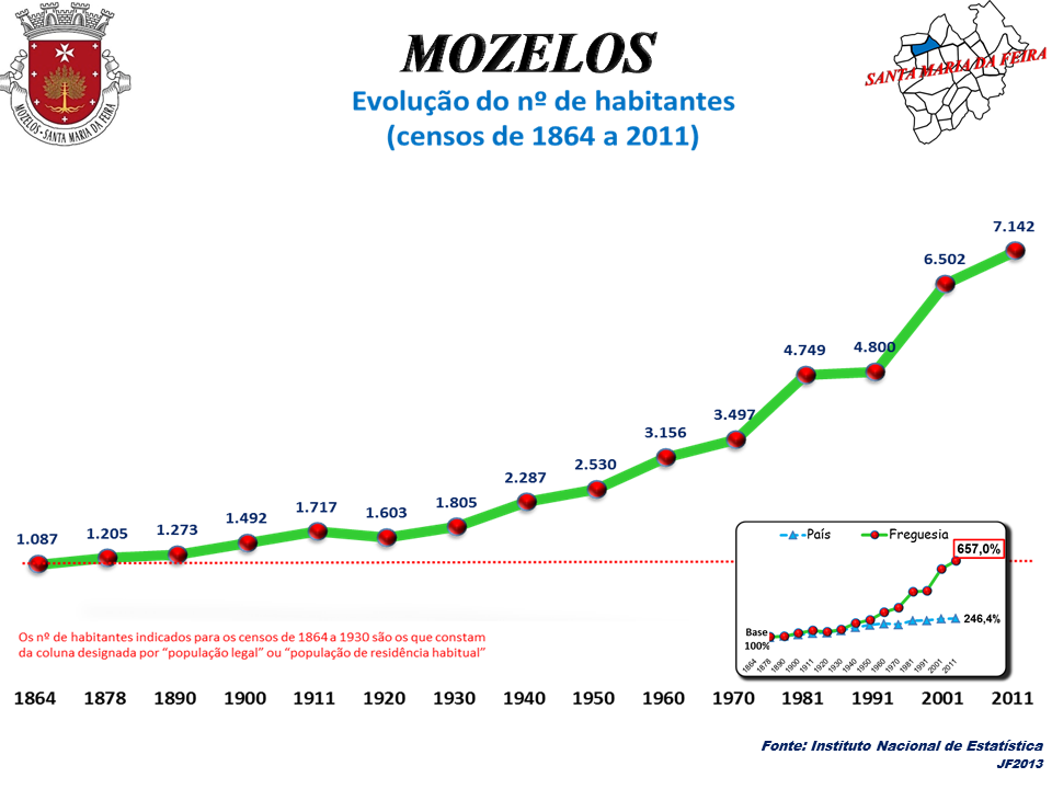 Evolução da População 1864 / 2011